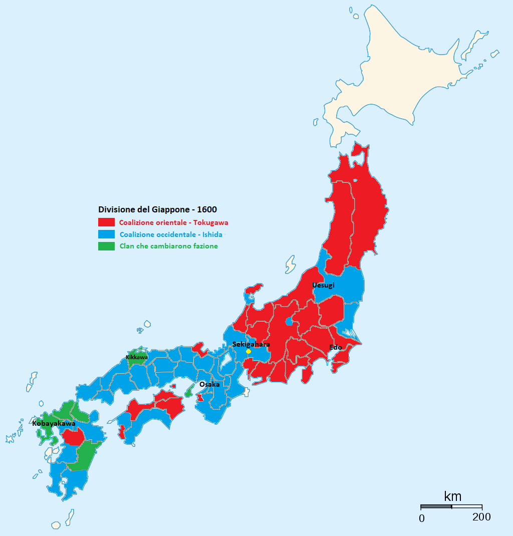 Sekigahara map more detailed